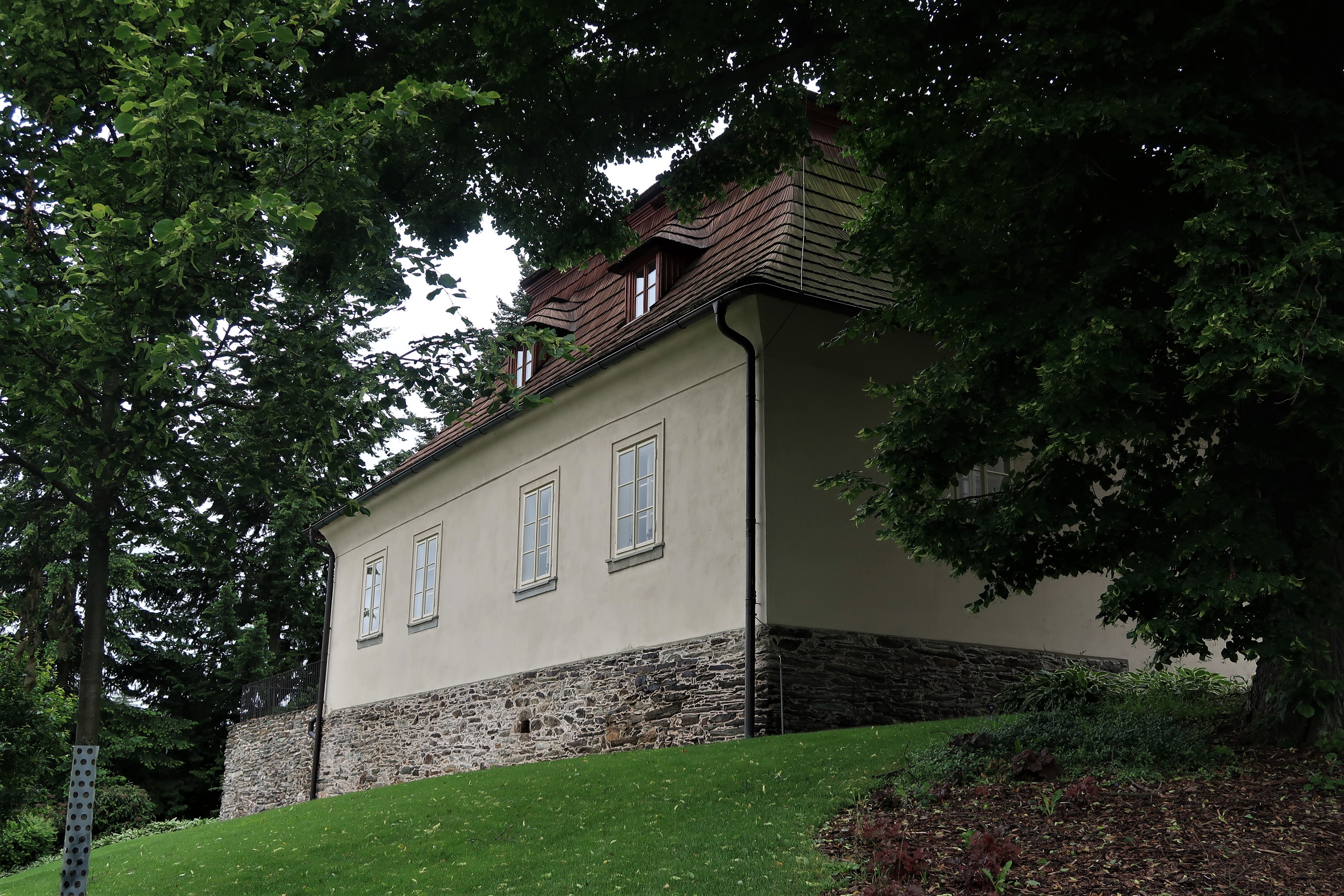 Fara v Roprachticích, pohled z farní zahrady